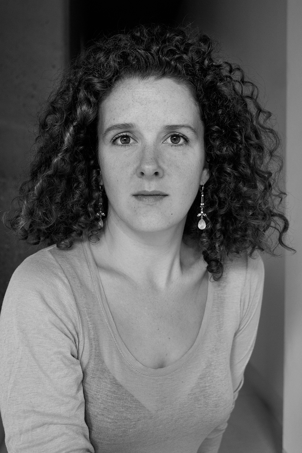 Portrait Franziska Hauser 2015